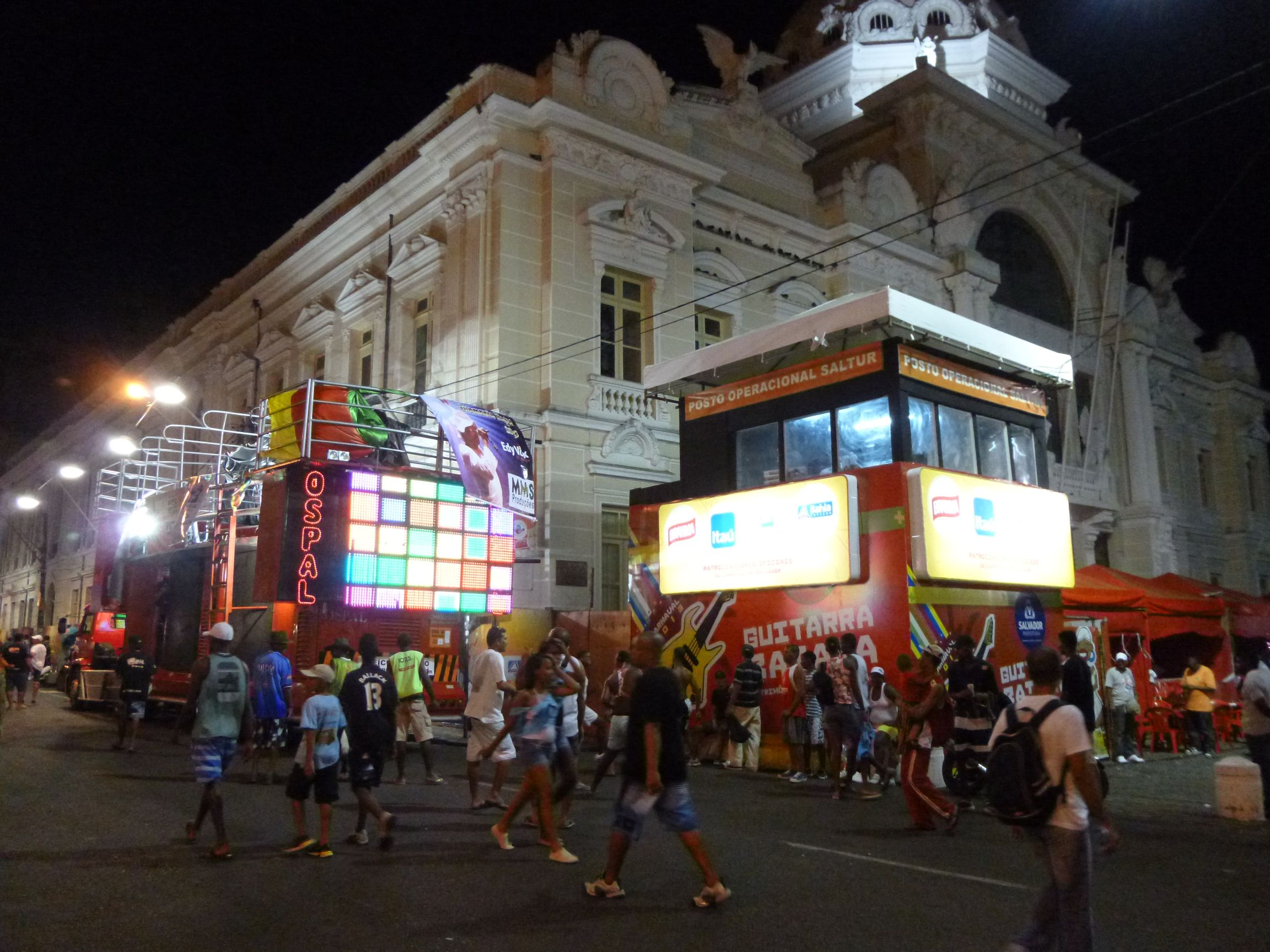 Auftakt zum Karneval 2013, Salvador Bahia